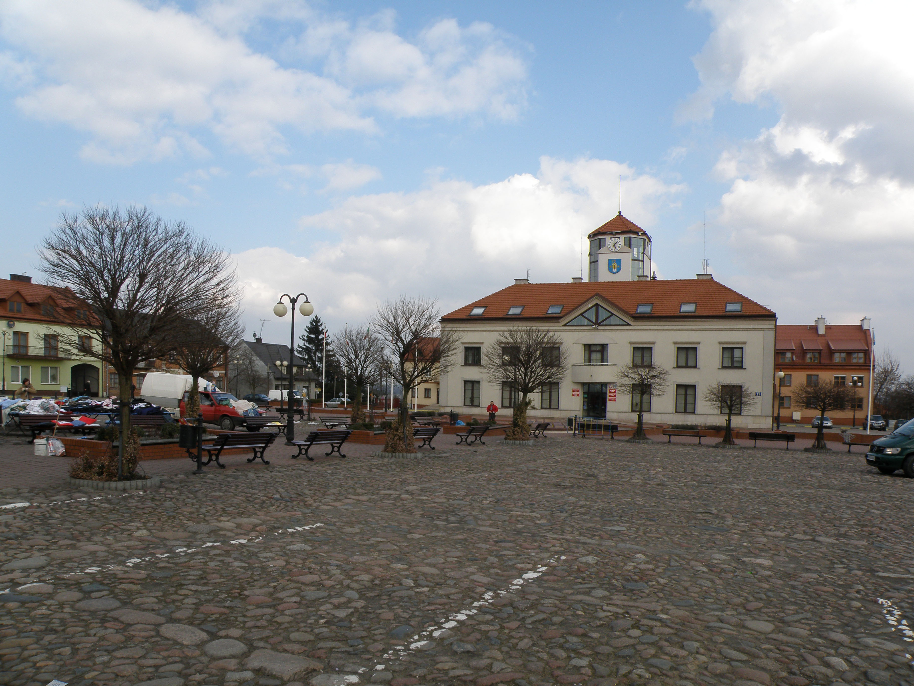 Serock (woj. mazowieckie, powiat legionowski) - Rynek